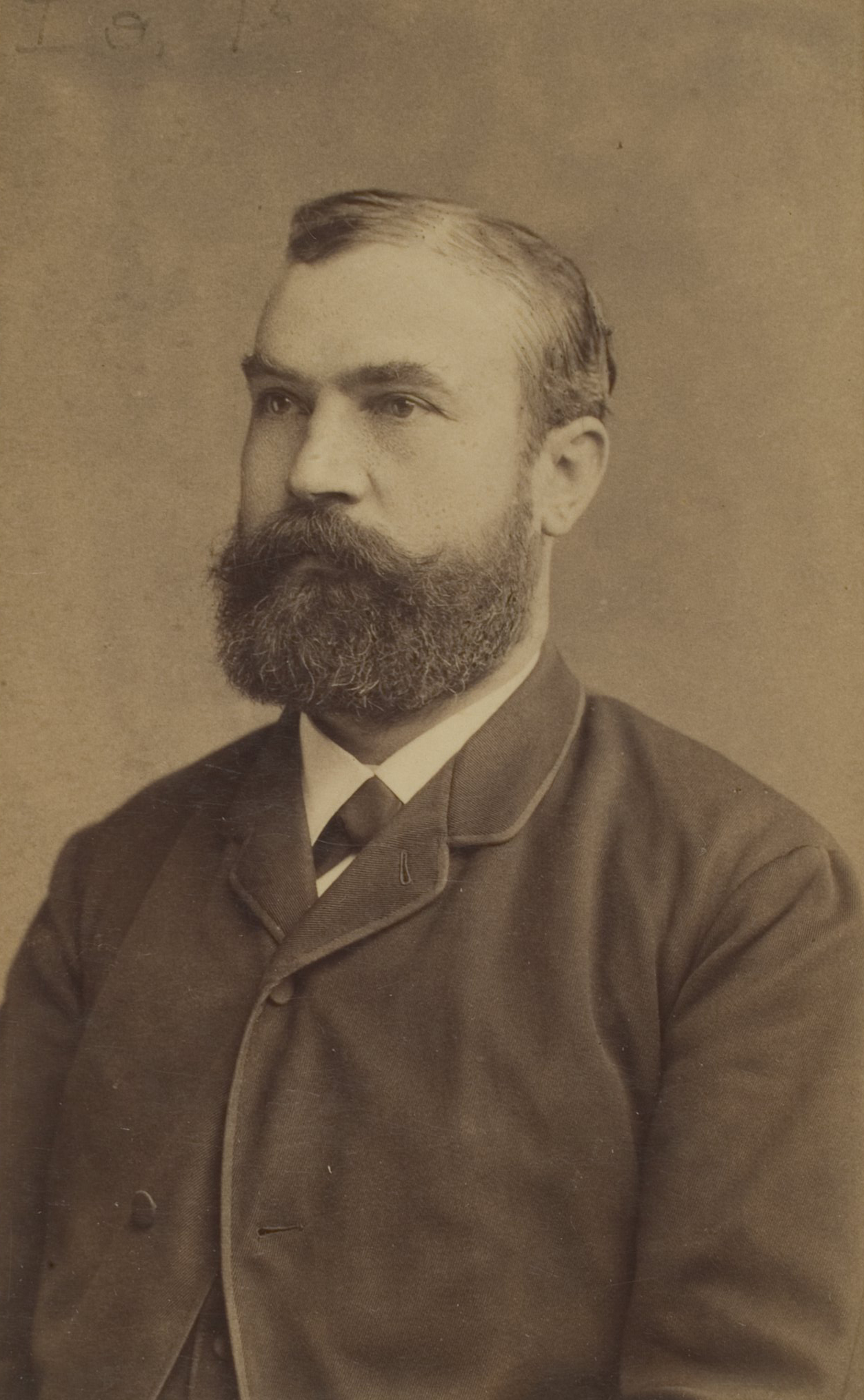 Caspar Carl Heinrich Gottfried Emil Franz Hermann Osthoff, Indogermanist, 1877–1907 Professor in Heidelberg